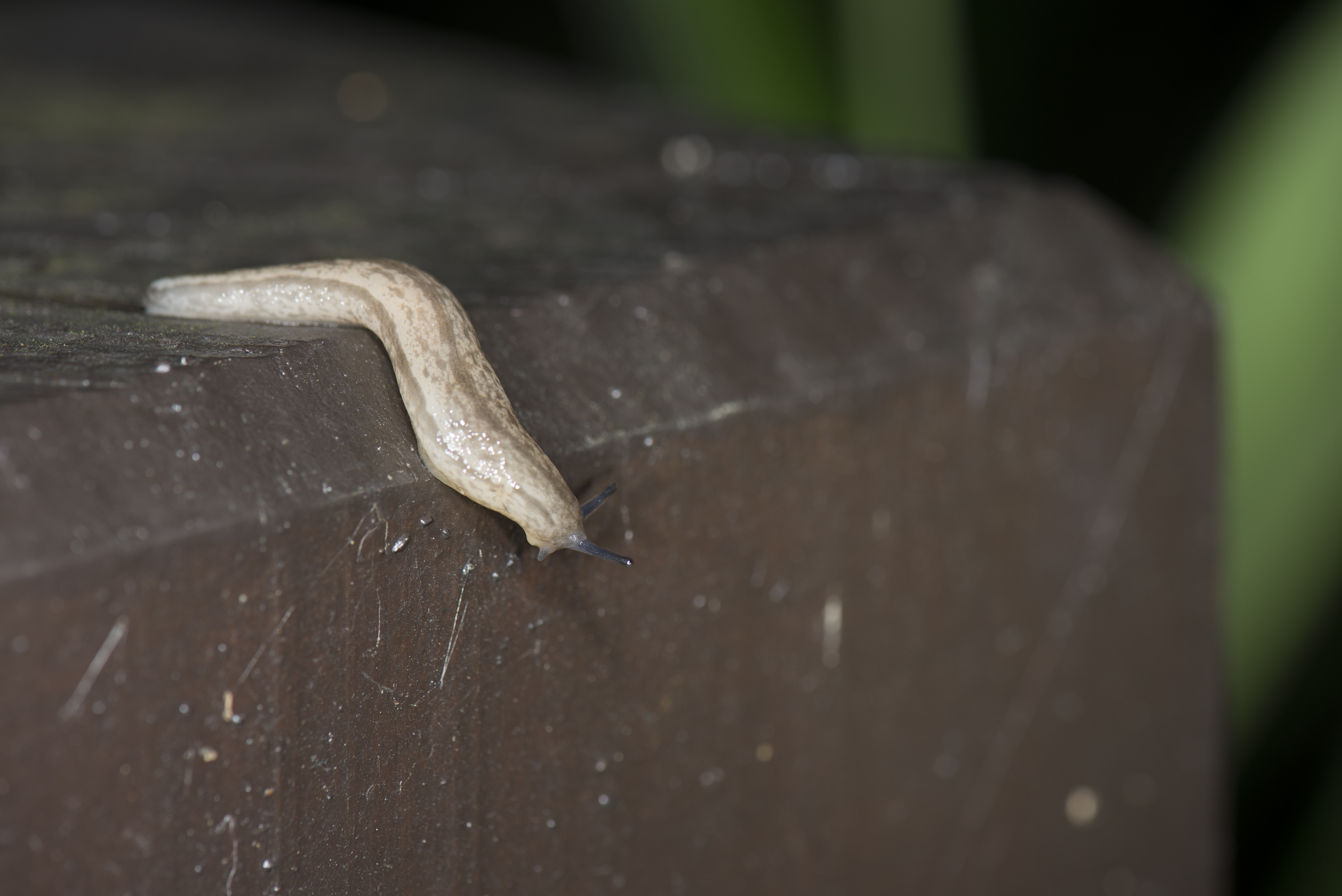 _ESI9604 Meghimatium bilineatum